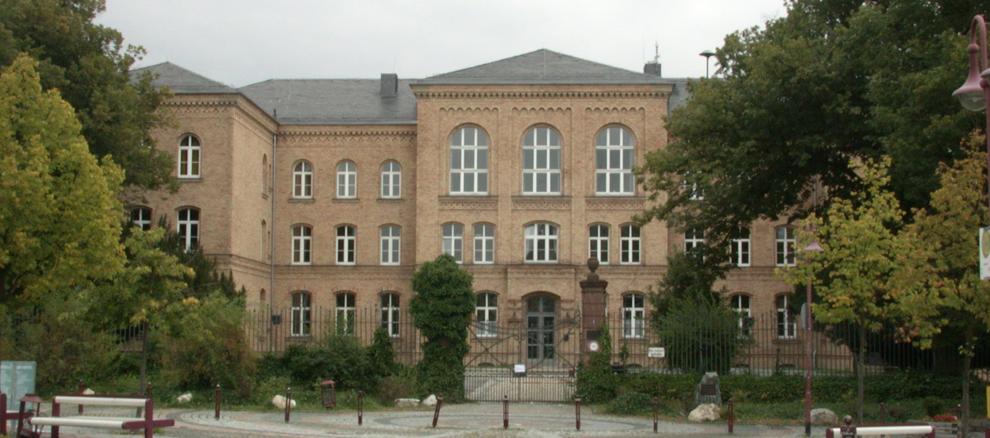 Schloss Usingen, Deutschland